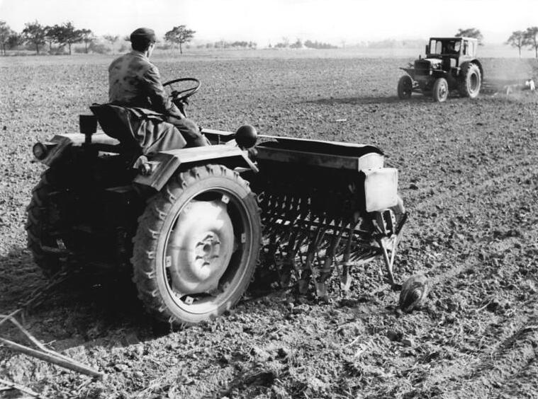 Hausdorf, Traktorist beim Aussäen Zentralbild Gahlbeck Nl-AT-27.10.1962 Feldbau-Speziealisten sorgen für hohe Qualität im Wettbewerb. Mit "gut", "genügend" oder "schlecht" wird die Arbeit der Traktoristen des MTS-Bereiches Naundorf im Kreis Rochlitz nach jeder Schicht bewertet. Gut fahren damit auch die LPG im MTS.Brigadebereich Hausdorf. So haben die Traktoristen der MTS zusammen mit Schichtfahrern aus den LPG am guten Zustand der Felder wesentlichen Anteil. Die fast 600 Hektar grosse Genossenschaft in Hausdorf erzielte in diesem Jahr durchschnittliche Hektarerträge von 38 dt Getreide, 250 dt Kartoffeln und 300 dt Zuckerrüben und überbot damit das langjährige Mittel seit Gründung der LPG im Jahre 1953 beträchtlich. Zusammen mit dem Brigadeleiterkollektiv der MTS will die Genossenschaft für die Ausbildung von genügend Feldbauspezialisten sorgen, damit im nächsten Jahr noch höhere Erträge erzielt werden können. Der Wettbewerb zur Vorbereitung des VI. Parteitages der SED wird zum Anlaß genommen, mehr Spezialisten aus den Reihen der Genossenschaftsbauern auszuwählen und einzusetzen. UBz: Traktorist Erich Kunath bei Drillarbeiten mit dem RS 09 auf einem Schlag der LPG Hausdorf. Er hat sich auf Arbeiten mit diesem Gerätetyp spezialisiert.